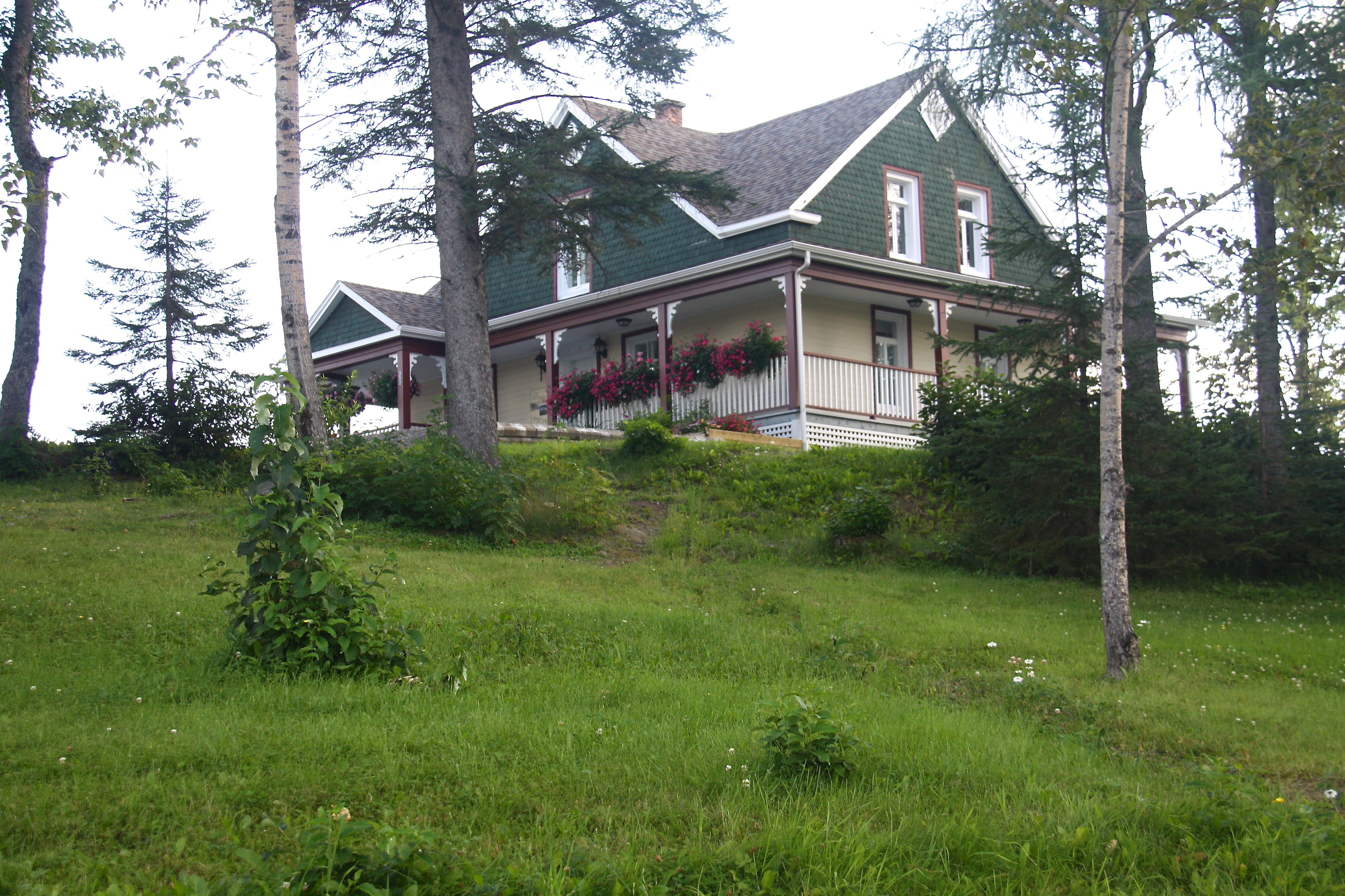 Maison Hector-Authier, 122, avenue Authier, Amos (Canada). (Protection IP cité. Voir la liste des lieux patrimoniaux de l'Abitibi-Témiscamingue pour plus de détails).